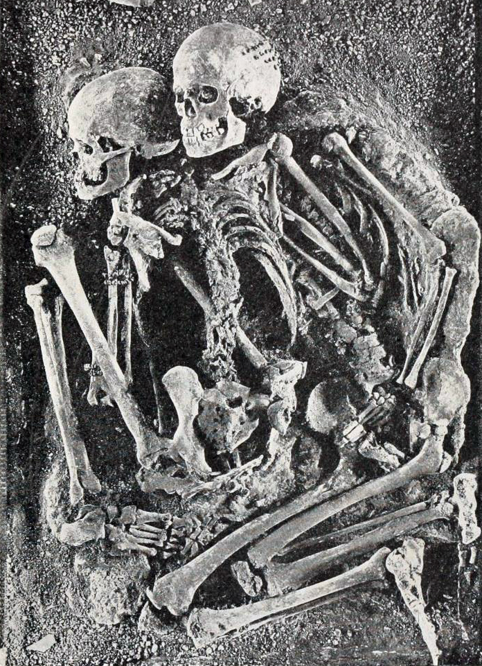 Grimaldi Man skeletons.